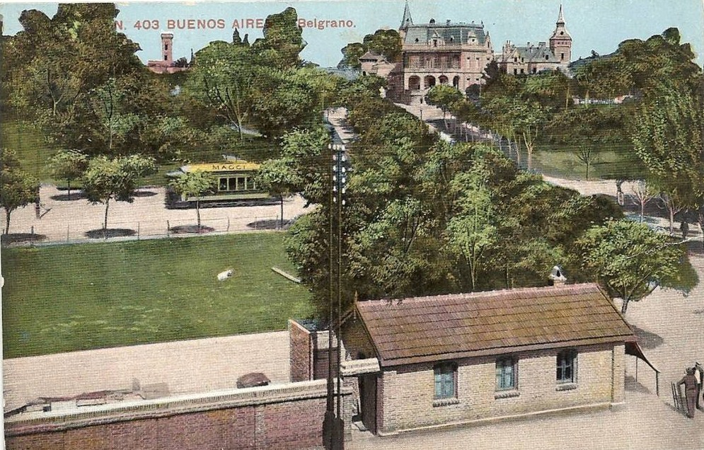 Vista de la plaza Barrancas de Belgrano en Buenos Aires, desde la estación Belgrano C del Ferrocarril Central Argentino (hoy Ferrocarril Mitre). Atrás de la plaza se distinguen residencias de clase alta, hoy reemplazadas por torres de departamentos.